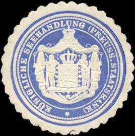 Sealing stamp Title: Königliche Seehandlung (Preussische Staatsbank) Description: blau, weiß, geprägt Place: size: 3 cm